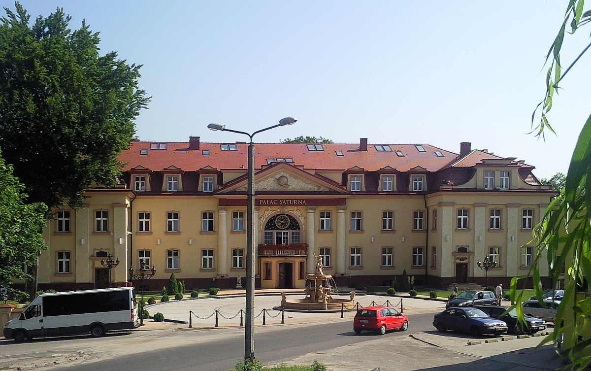 Widok ogólny na Pałac Saturna od strony ulicy Dehnelów.